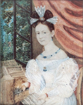 Ernestine von Fricken, die erste Verlobte von Robert Schumann, im Alter von etwa 19 Jahren